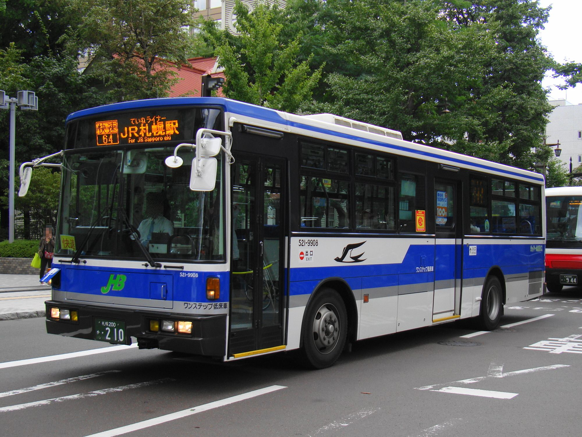 Sapporo city line